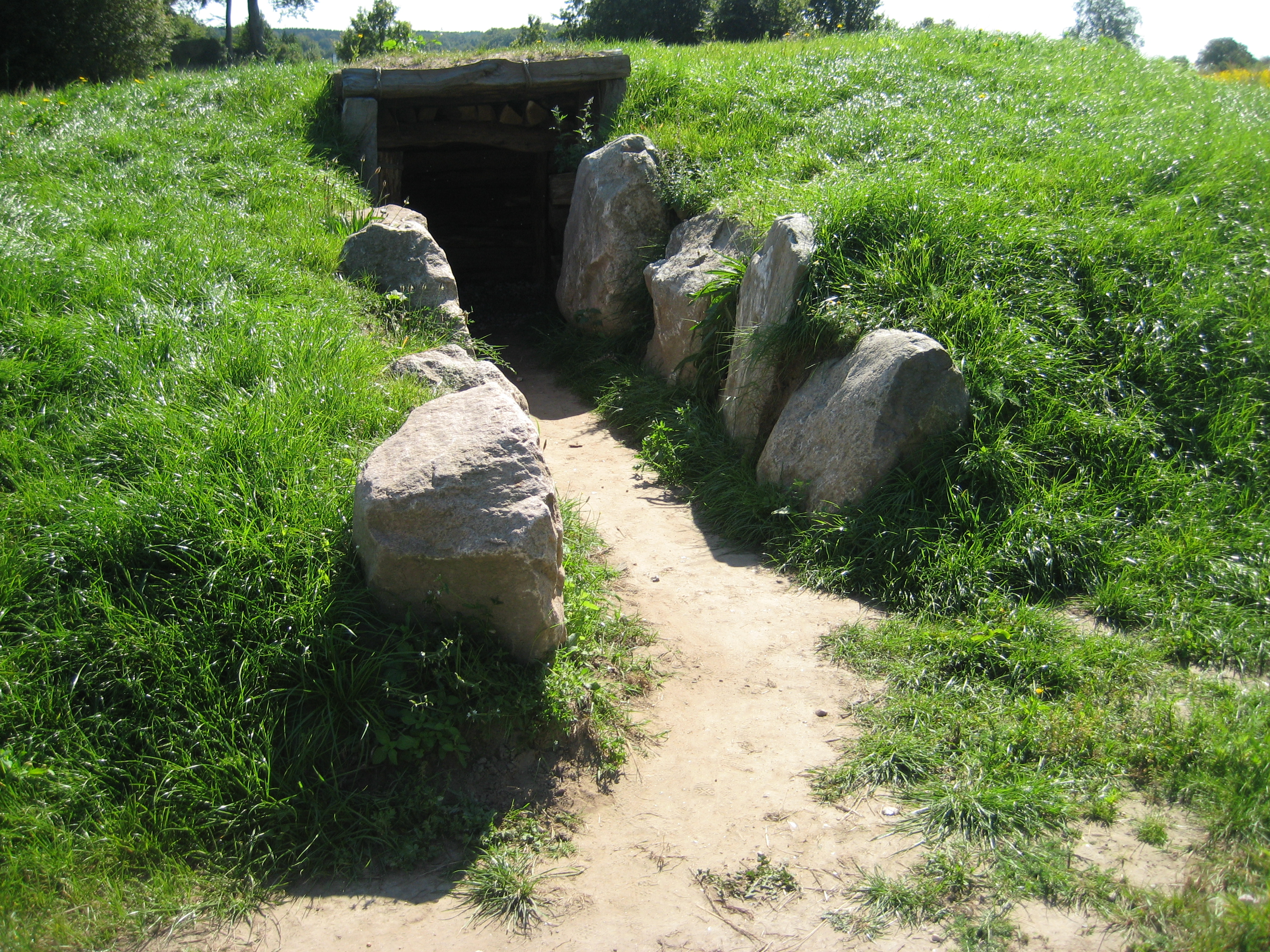 Fotos aus dem Naturerlebnisraum Archäologisch-Ökologisches Zentrum Albersdorf Eingang zu einem nachgebildetem Grab, für Besucher auf eigene Gefahr (Kopf einziehen) zugänglich